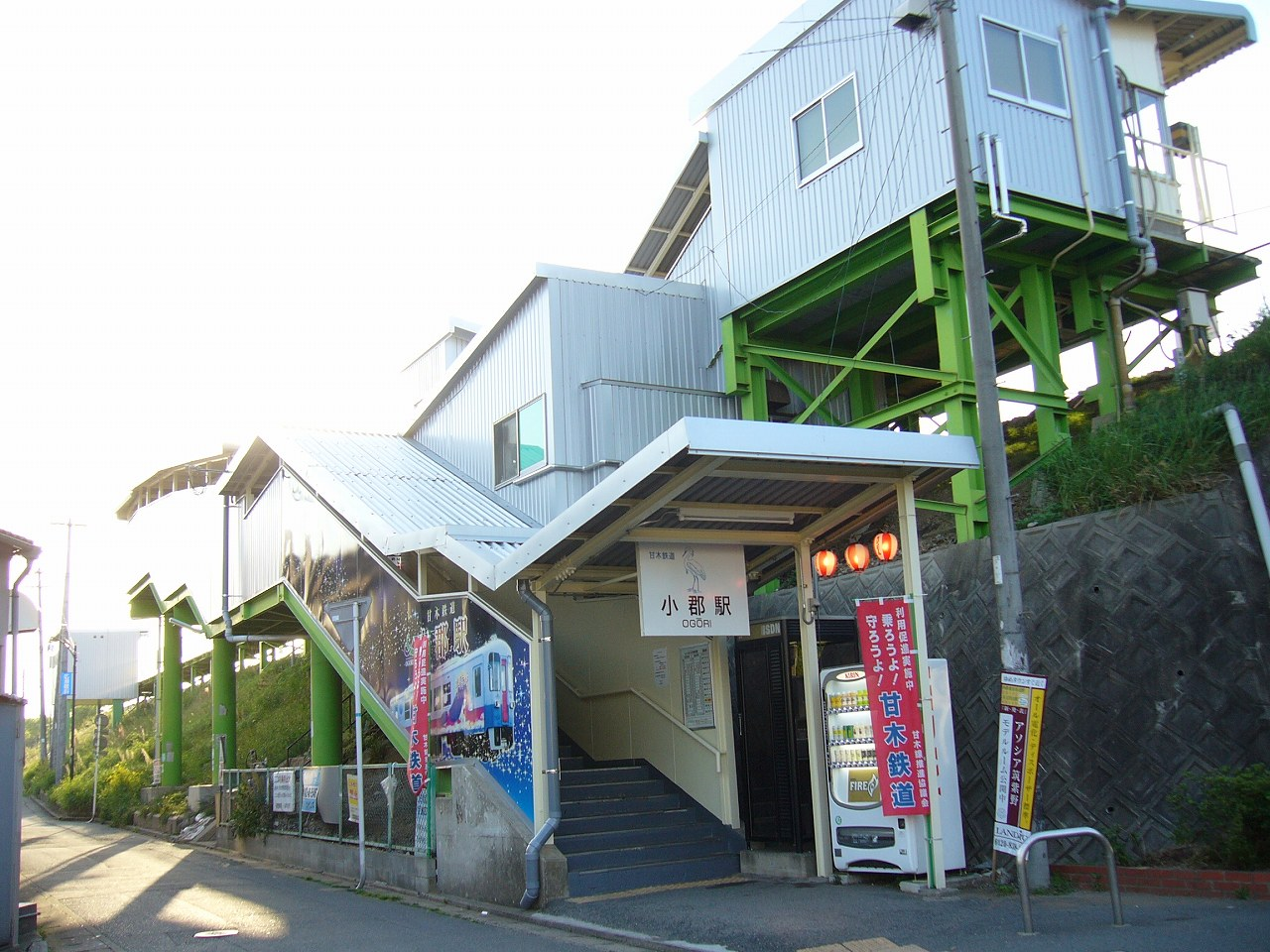 駅舎 投稿者撮影